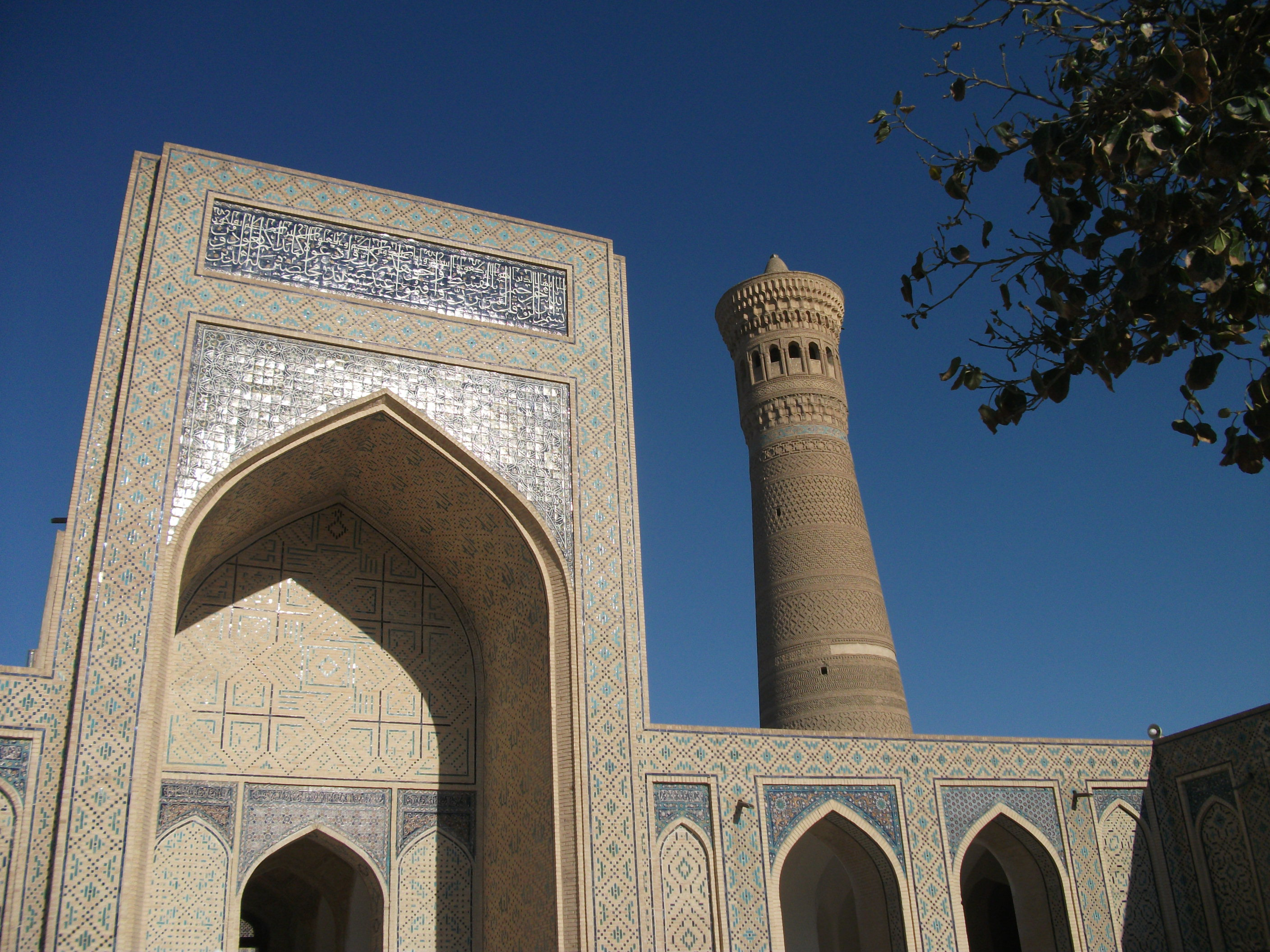 Мечеть Калян, Бухара